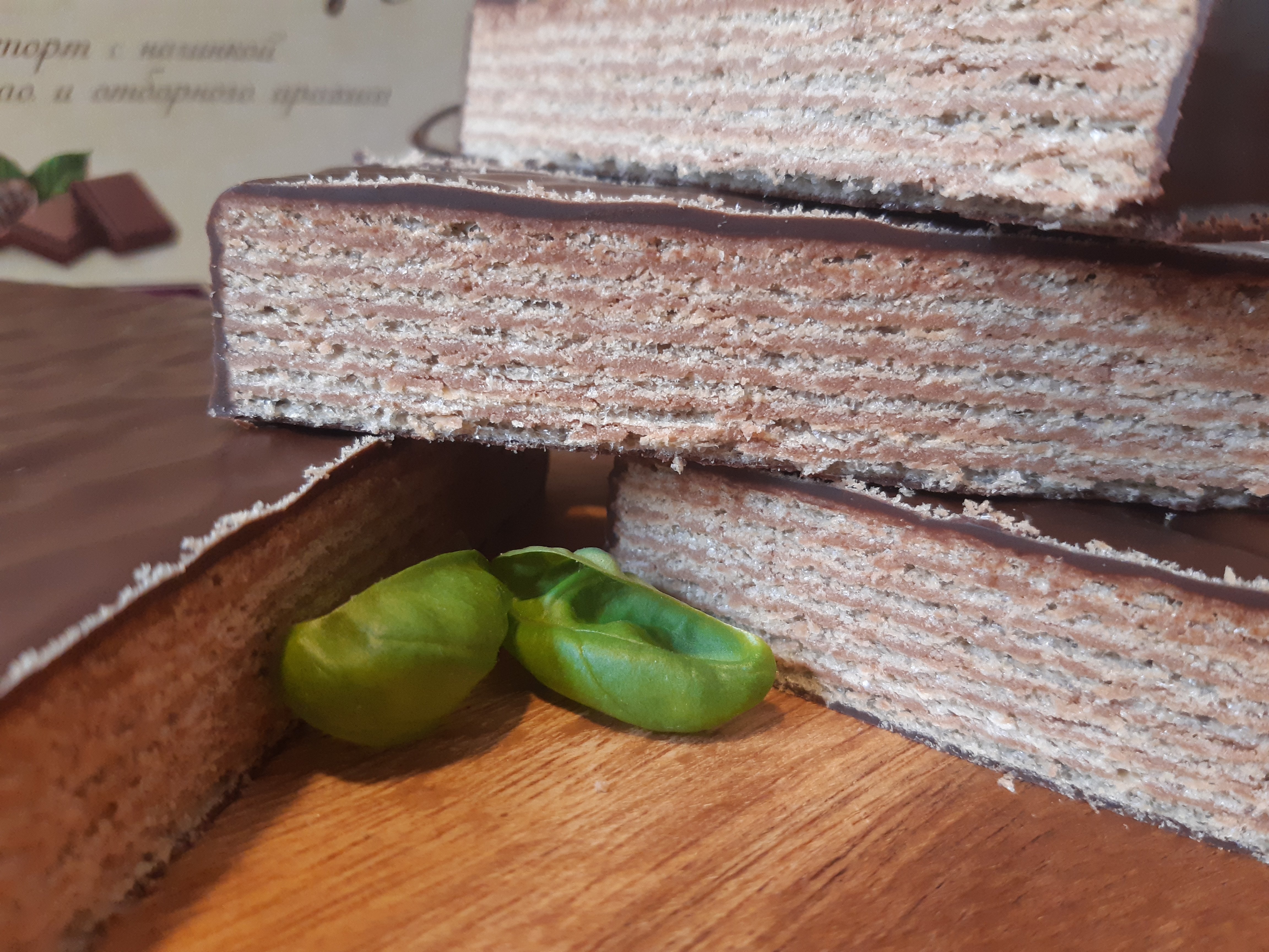 Торт вафельный «Шоколадница классическая» производства Московского булочно-кондитерского комбината «Коломенское», порезанный, с листочками мяты